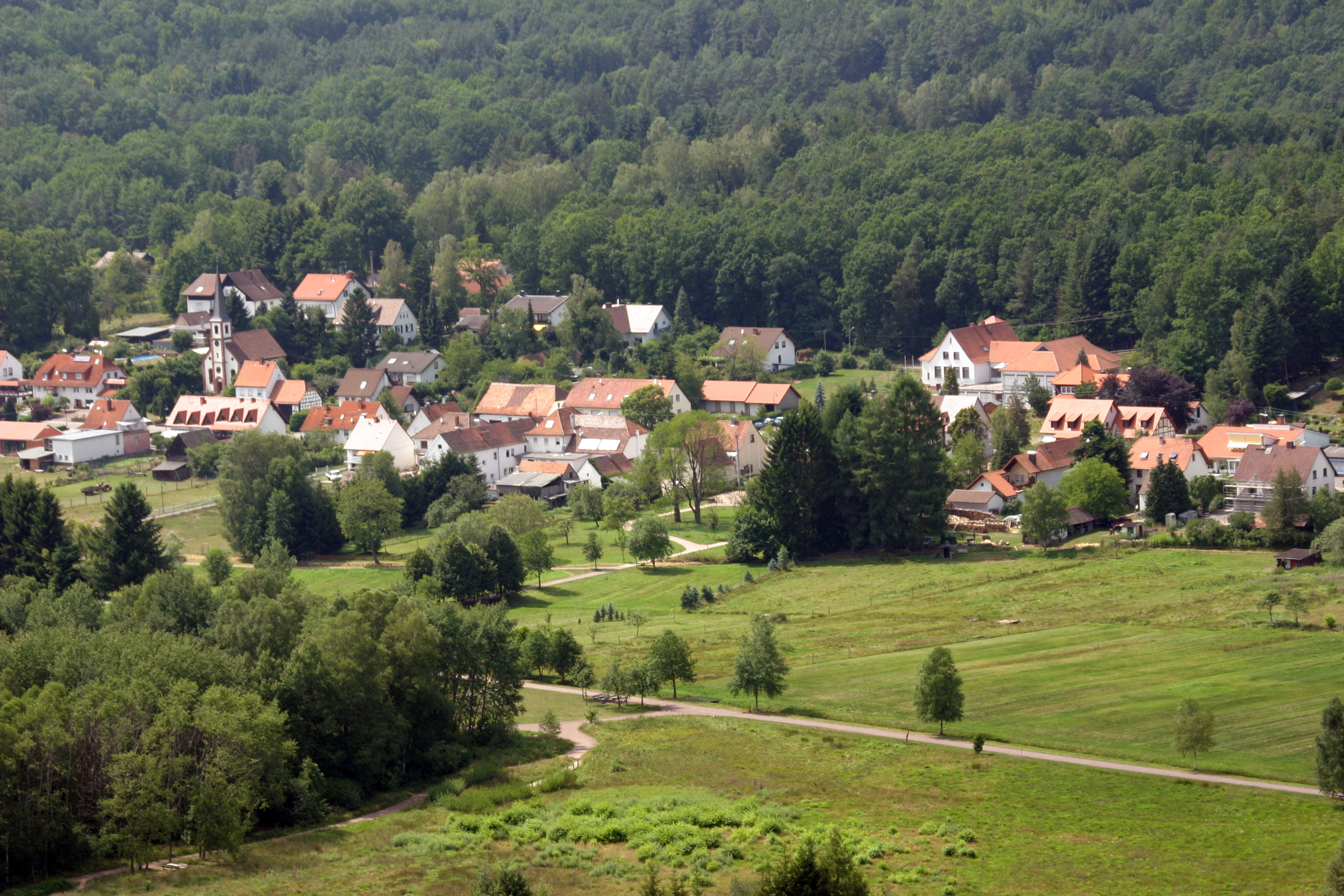 Ludwigswinkel